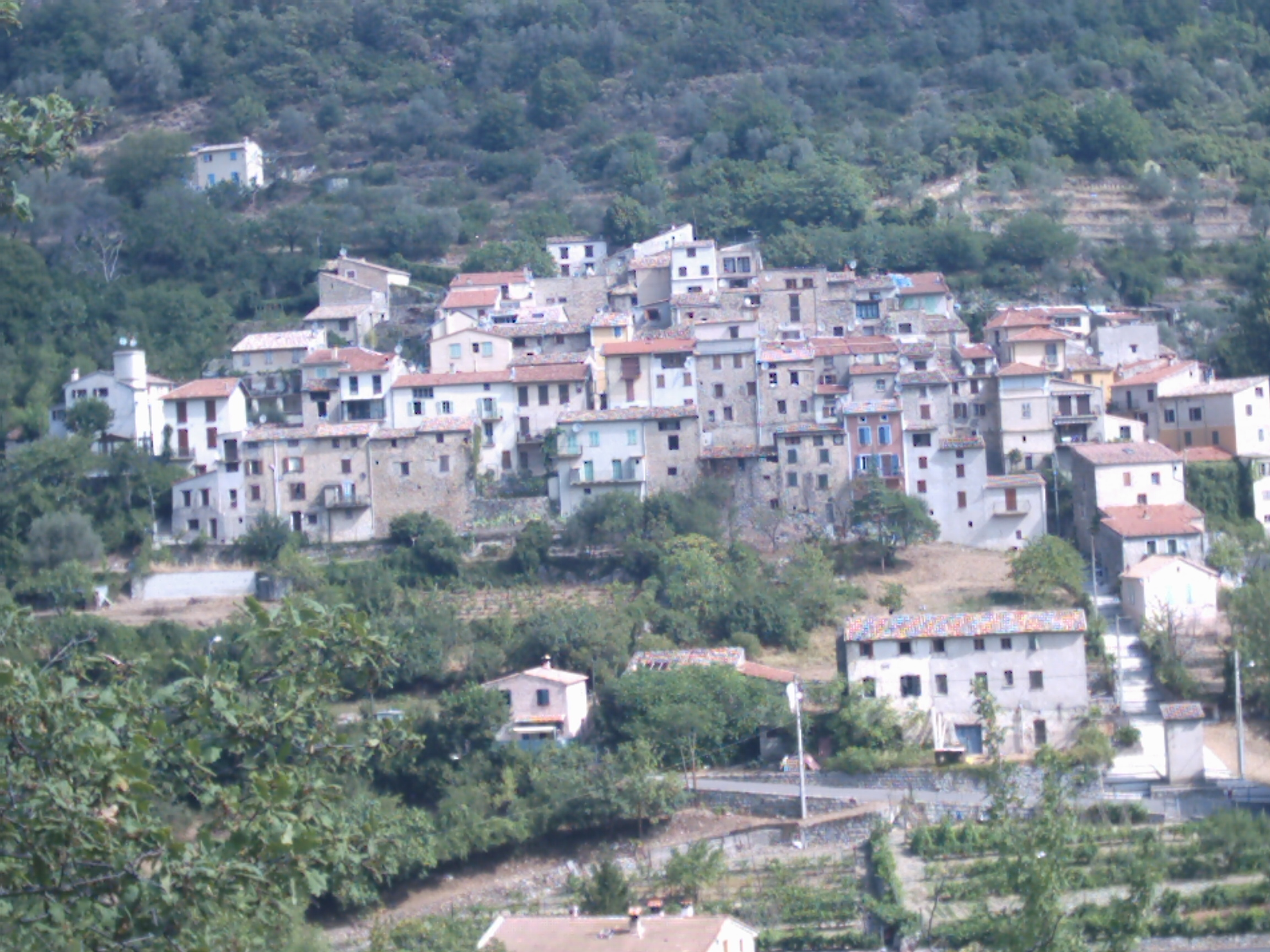 Conségudes